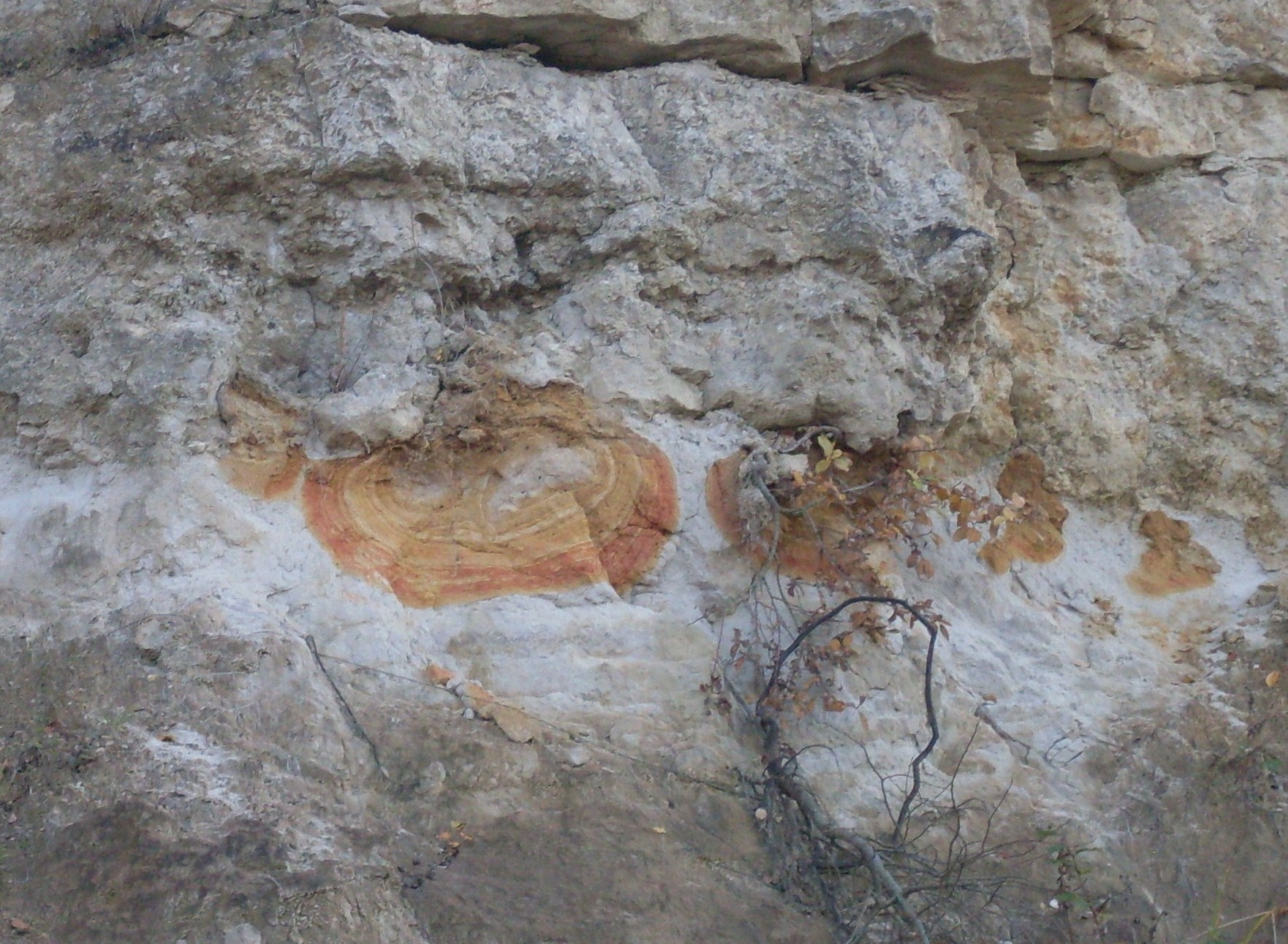 Kamieniołom Zalas. Zręby